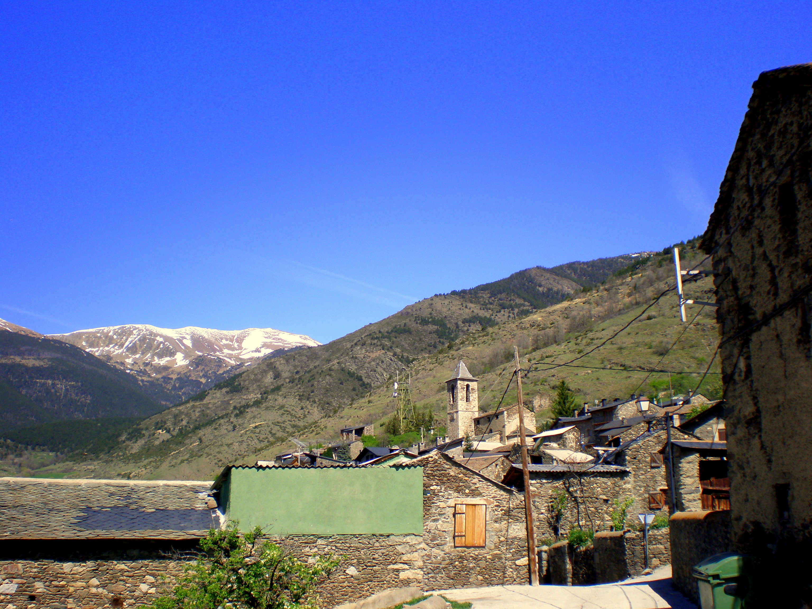 MERANGES - Vista del poble